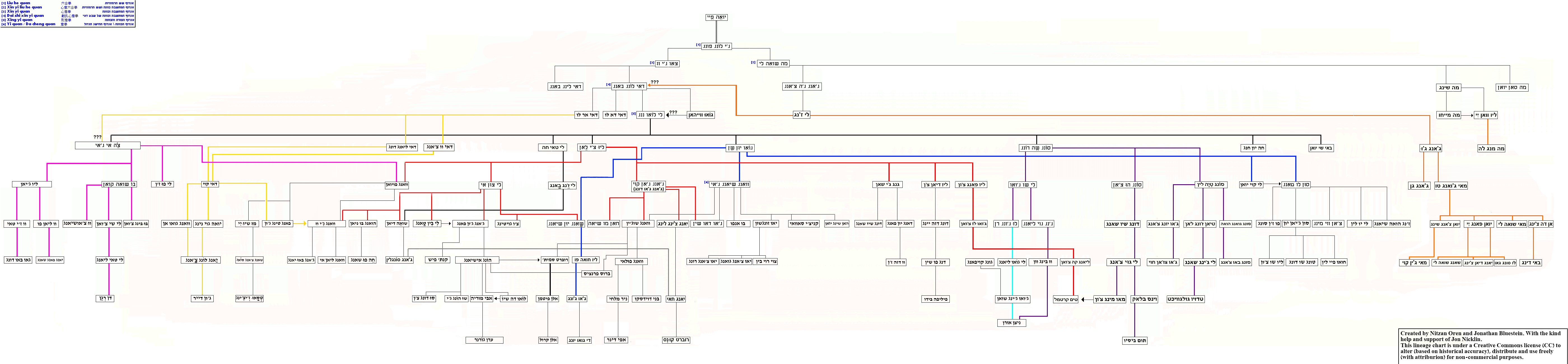 תרשים זרימה של שושלת אמנות הלחימה שינג אי צ'ואן